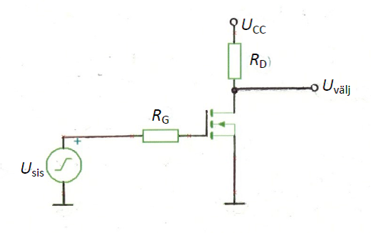 Enda tehtud